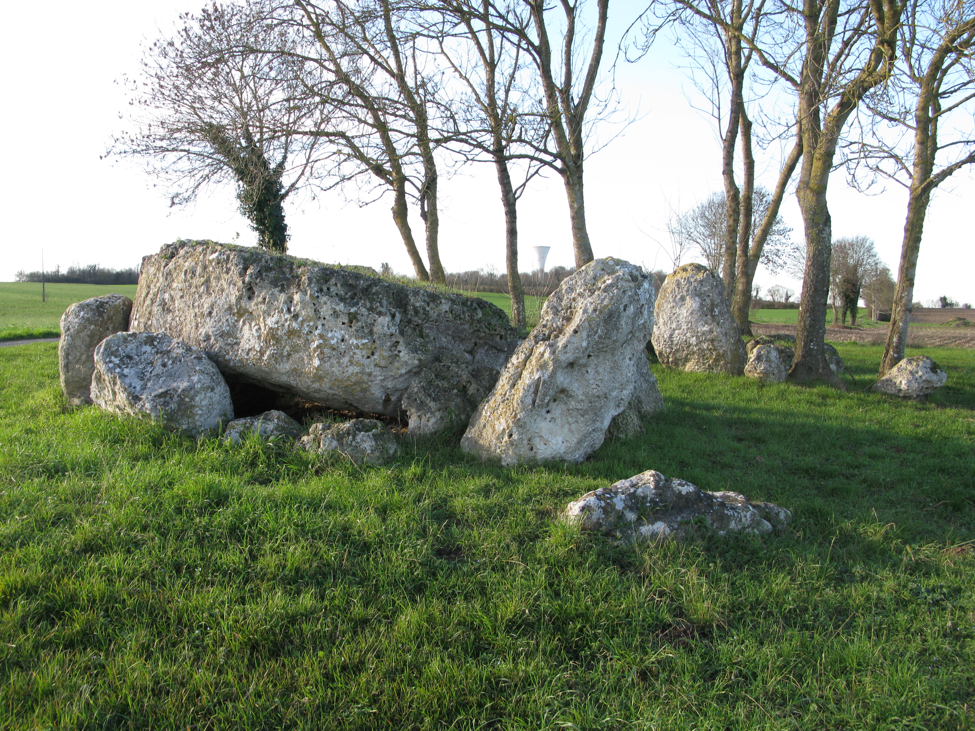 Le dolmen de la pierre levée à La Vallée.